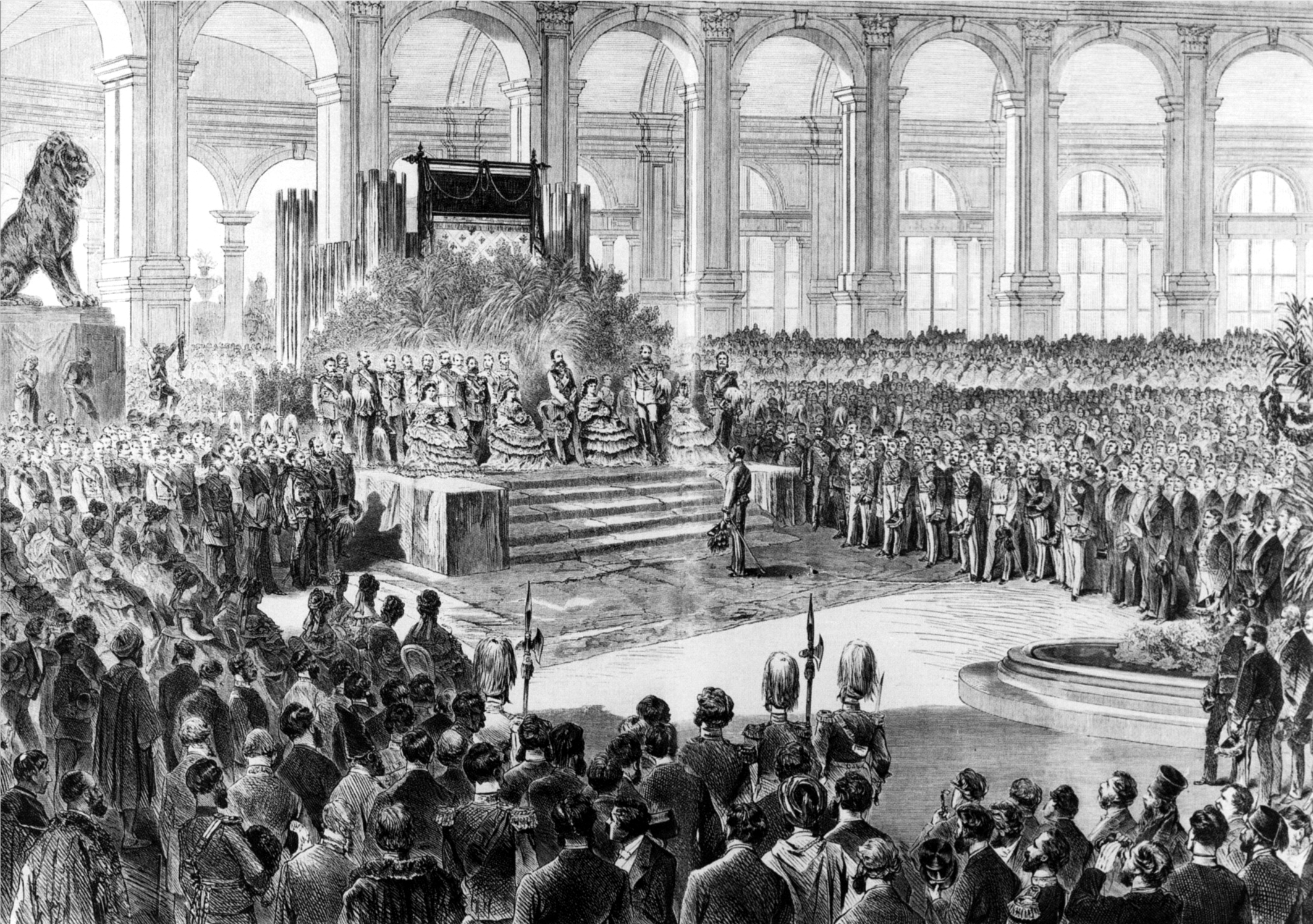 Eröffnung der Wiener Weltausstellung am 1. Mai 1873. Erzherzog Karl Ludwig begrüßt das Kaiserpaar und prominente Gäste aus aller Welt. Holzstich nach einer Zeichnung Vinzenz Katzlers.